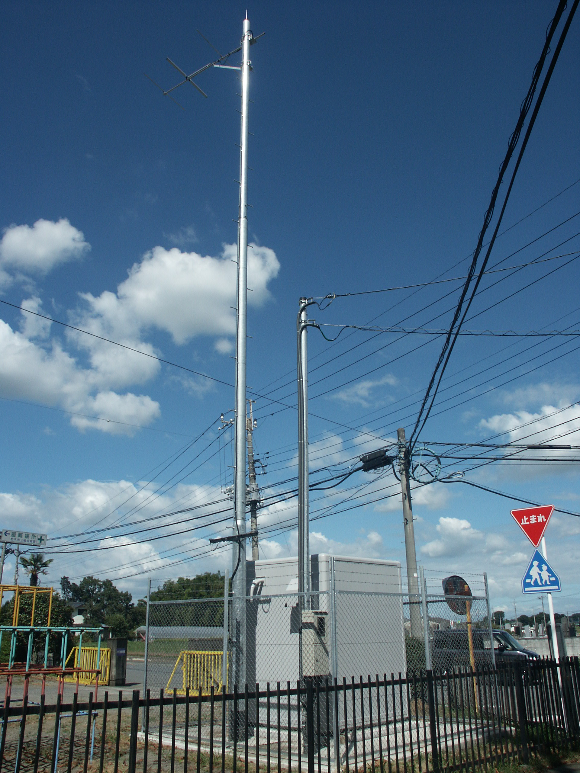 栃木市立三鴨保育所内に設置されているとちぎシティFM中継局送信アンテナ